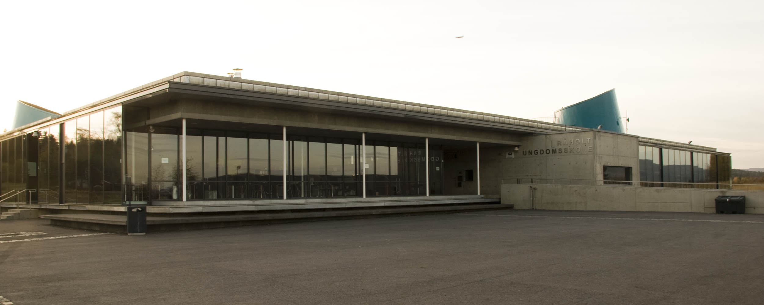 Råholt ungdomsskole 2007